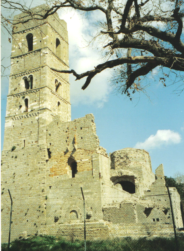 descrizione: Abbazia di San Rabano (GR) lavoro personale di Vinattieri Matteo (25/01/2007) che lascia in pubblico dominio